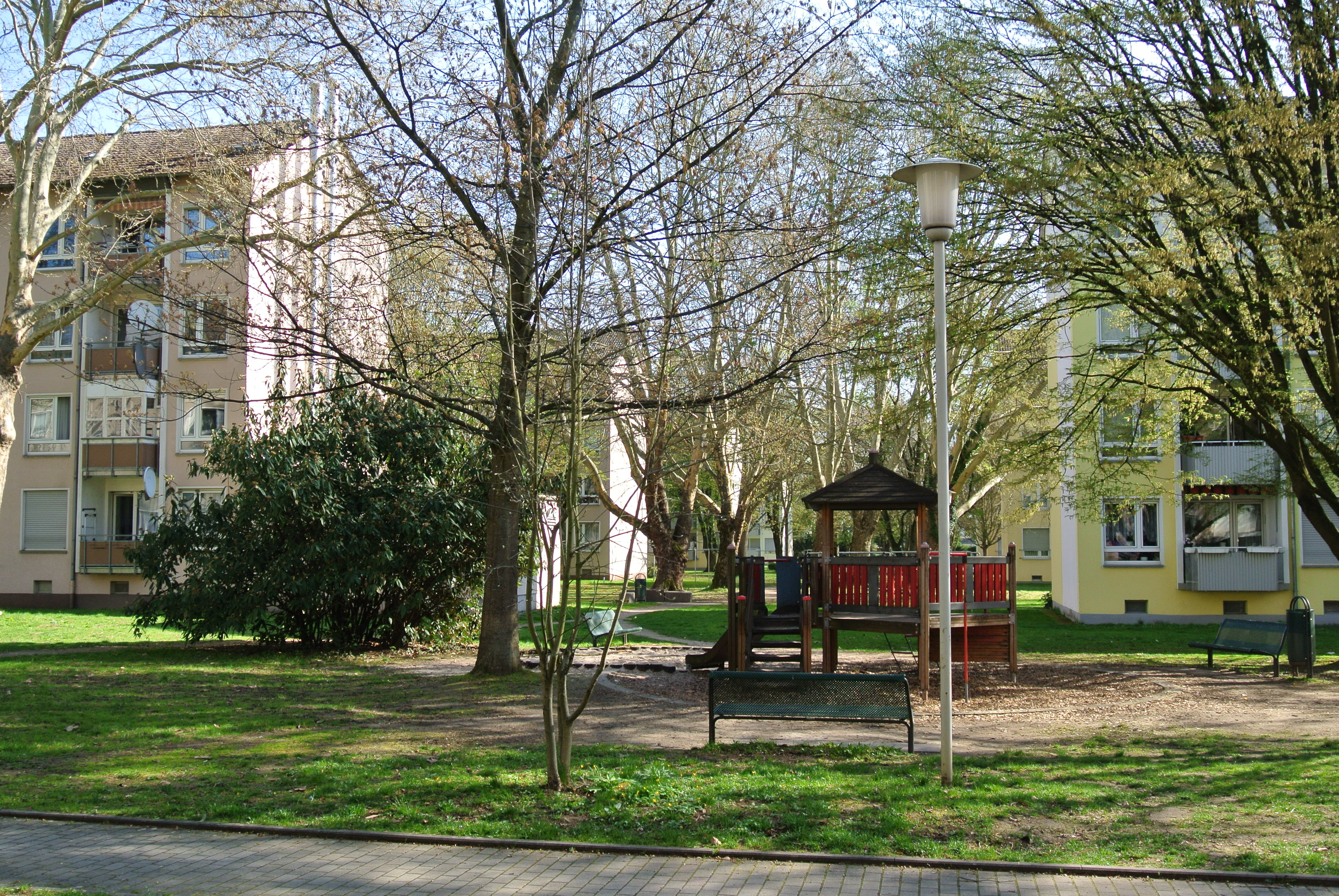 Grün- und Spielflächen zwischen den Gebäudezeilen